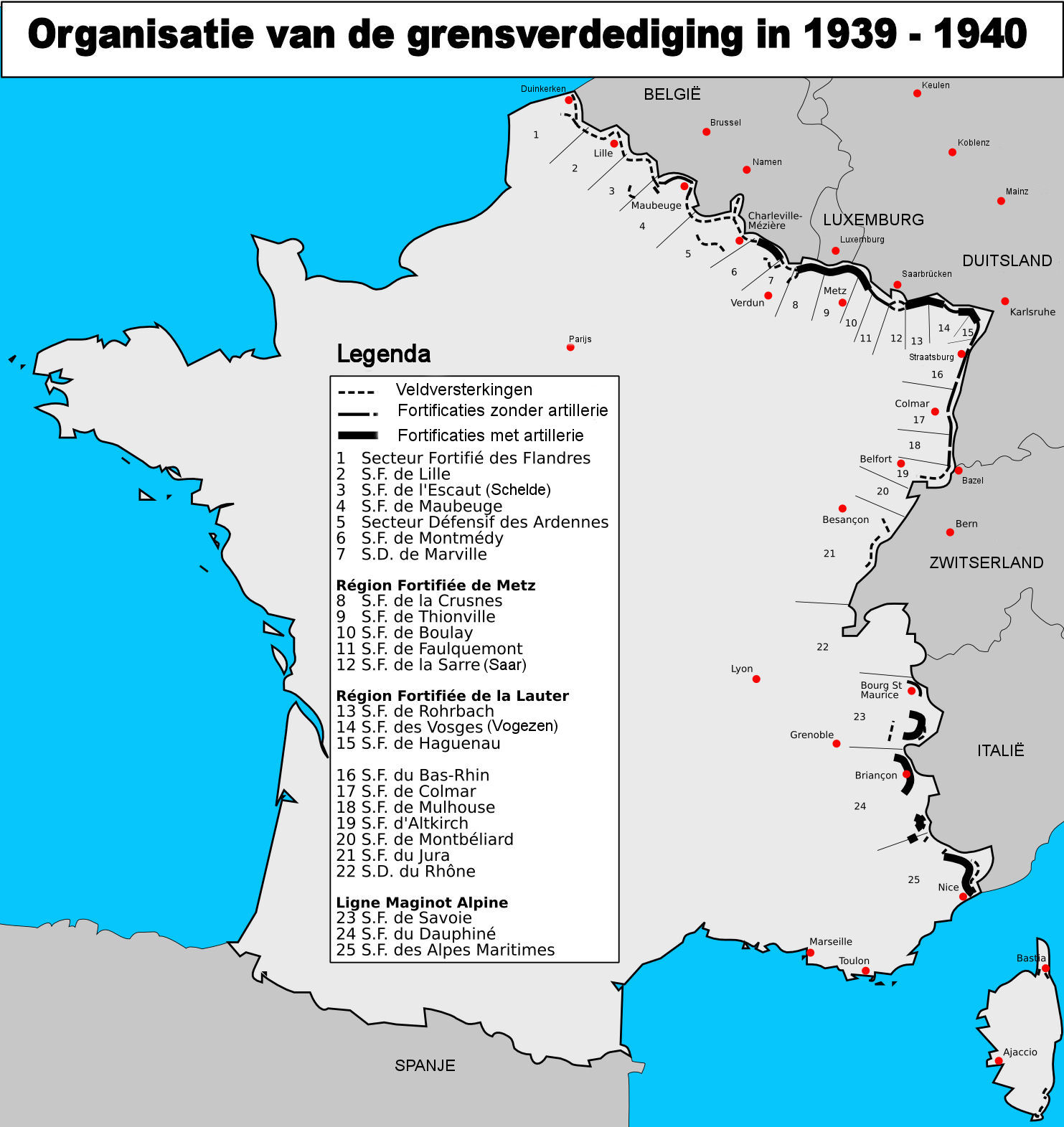 Carte représentant l'organistation défensive de la France en 1939-1940